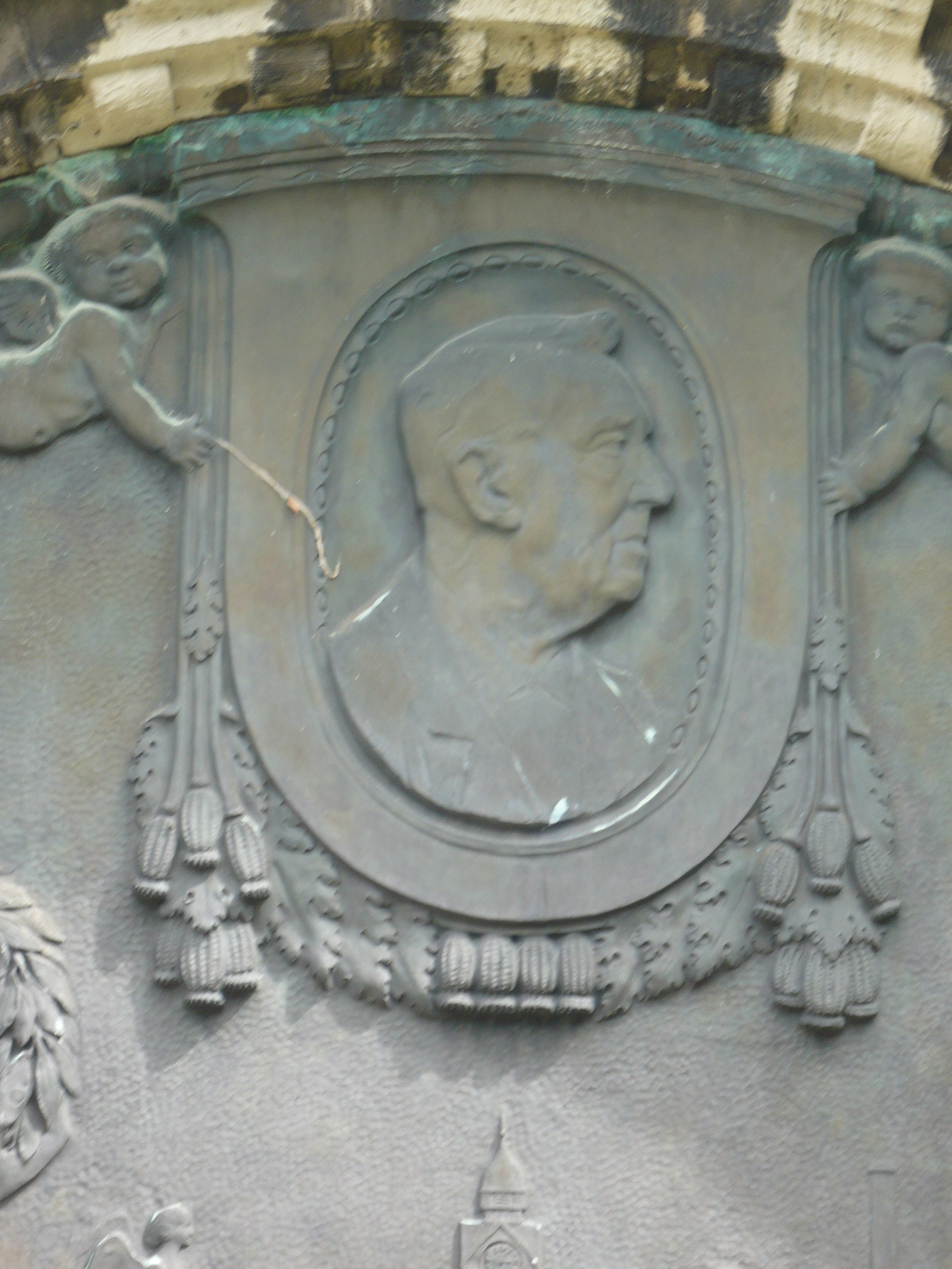 Stadt Aue, Grabmal Wellner auf dem Friedhof